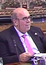 35 millones para Castilla y León en el reparto de la Sectorial de Agricultura